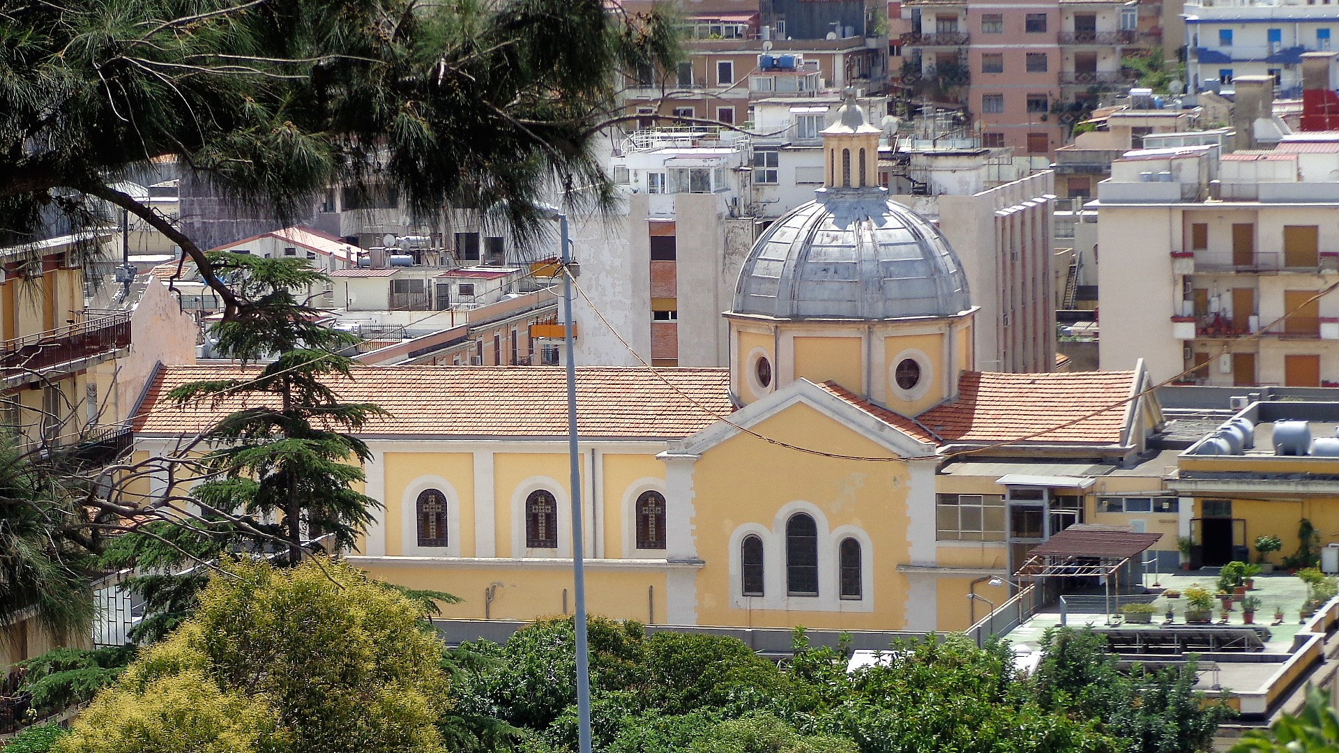 La concattedrale vista dalla chiesa di Montalto.